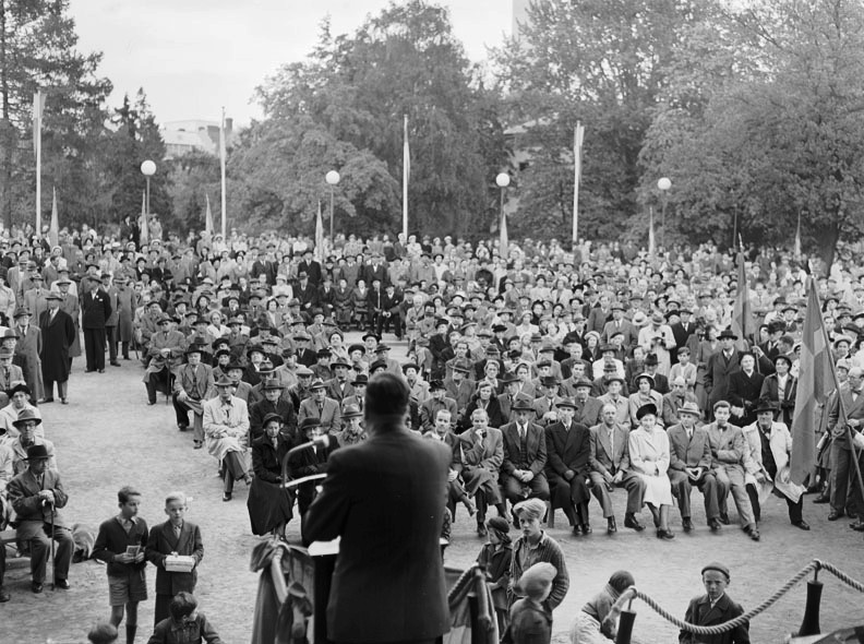 Högerns stora möte i Vasaparken. 5000 stockholmare kom för att lyssna